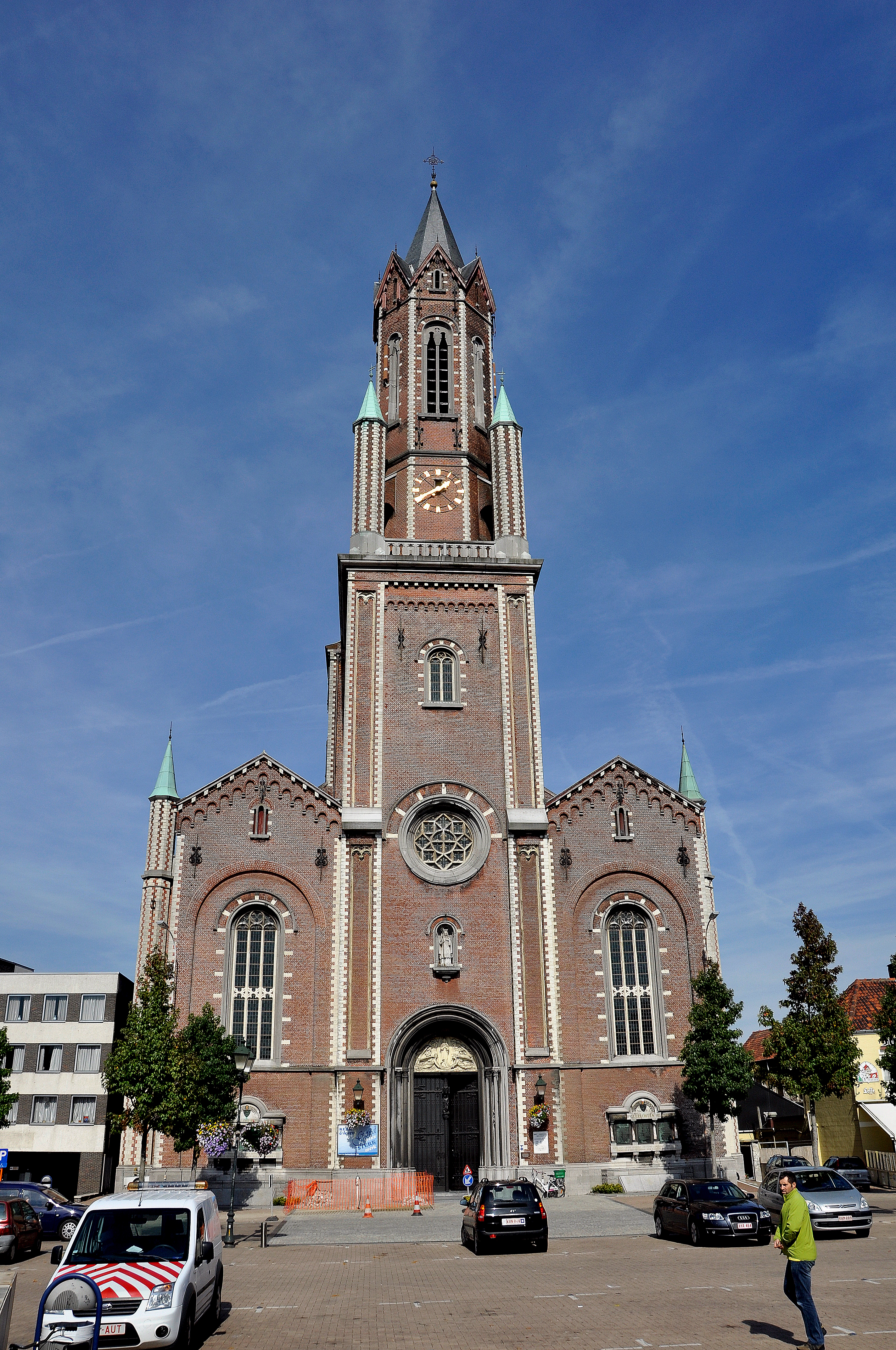 De Sint-Gertrudiskerk te Wetteren, België